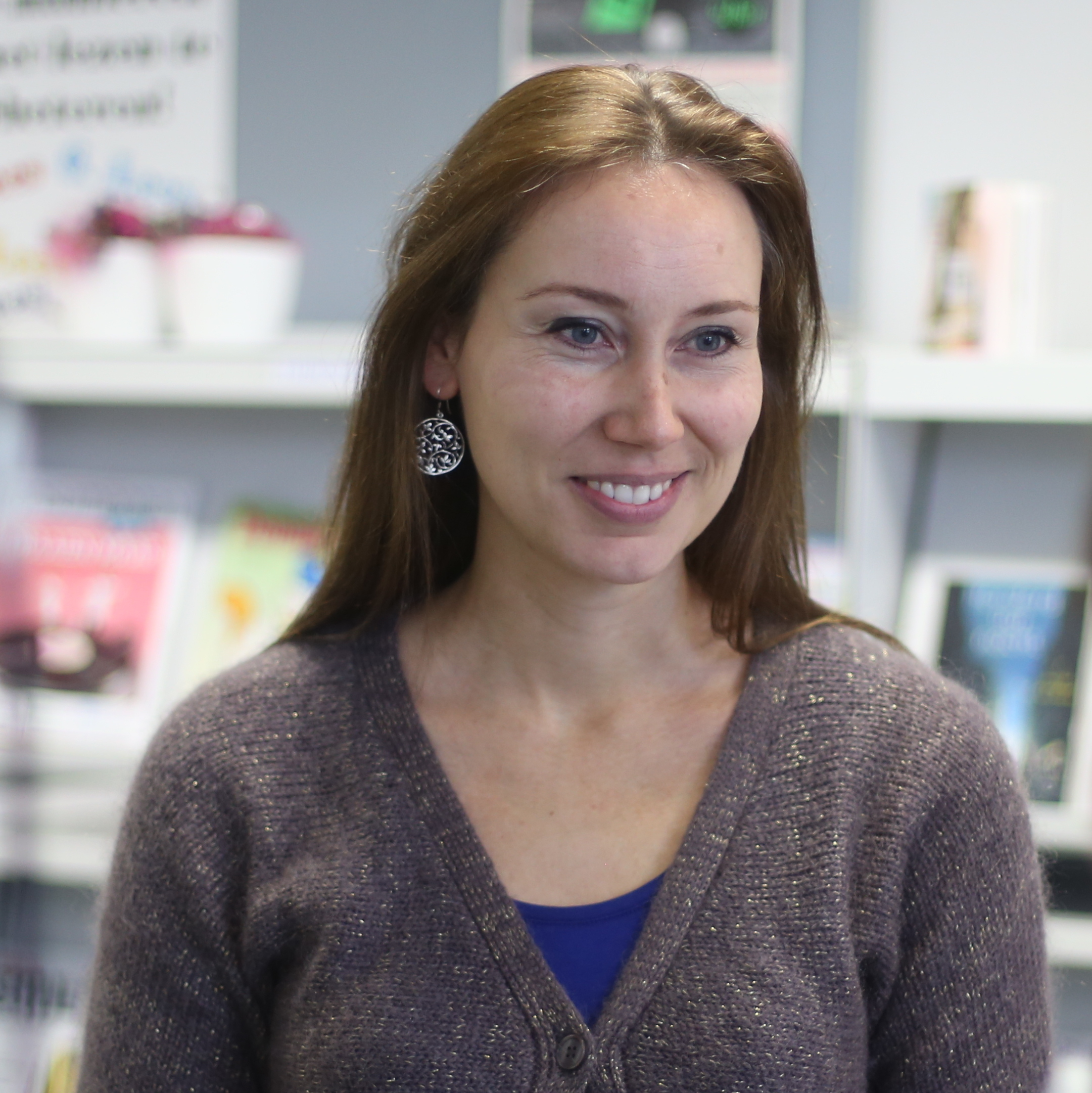 Schrijfster Anna Woltz tijdens een schoolbezoek aan het Esdal College in Emmen